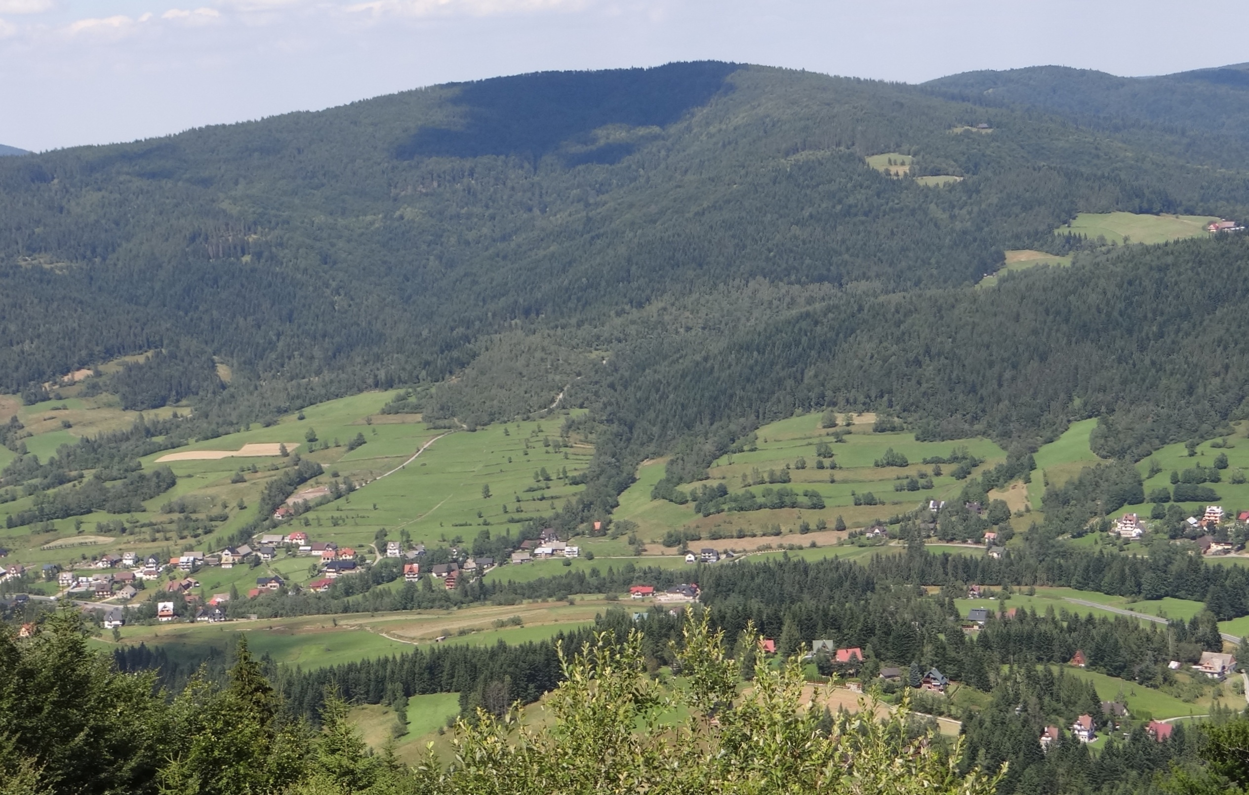 Widok na Jasień i Lubomierz z polany Jaworzynka w Gorcach